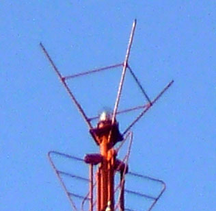 東京タワーの最上部